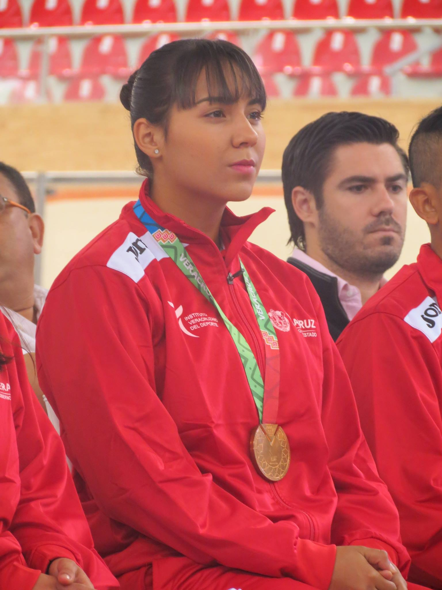 Medallista Centroamericana Veracruz 2014